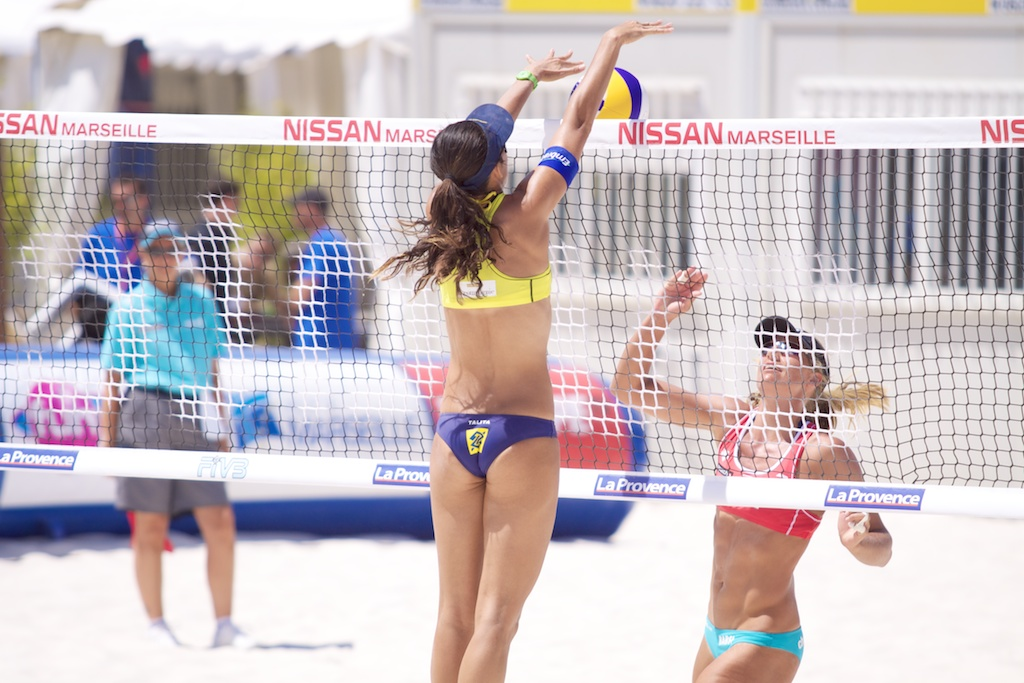 FIVB Worldtour 2010 Talita Antunes [Brazil], Barbara Hansel [Austria]